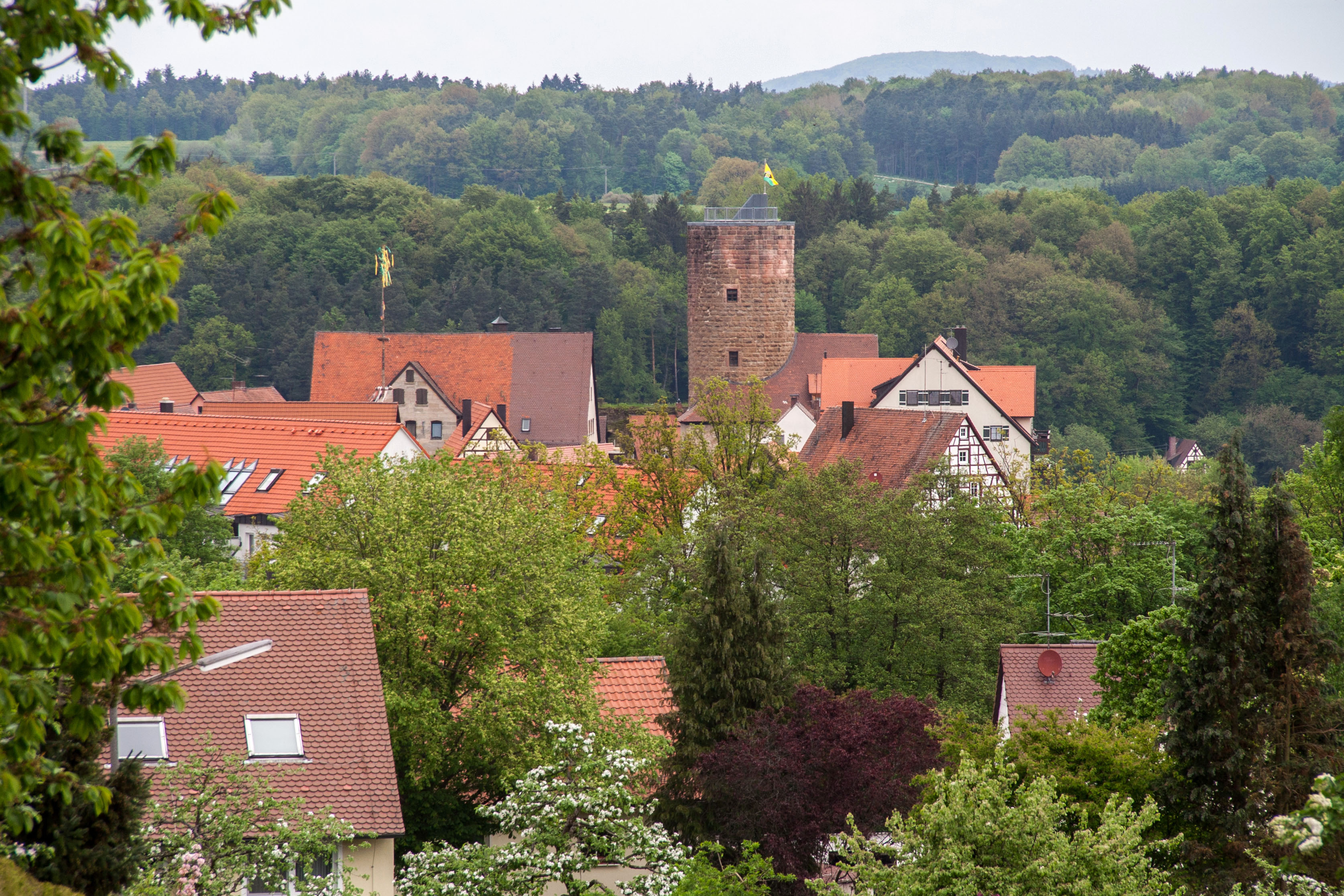 Burgthann, Burg